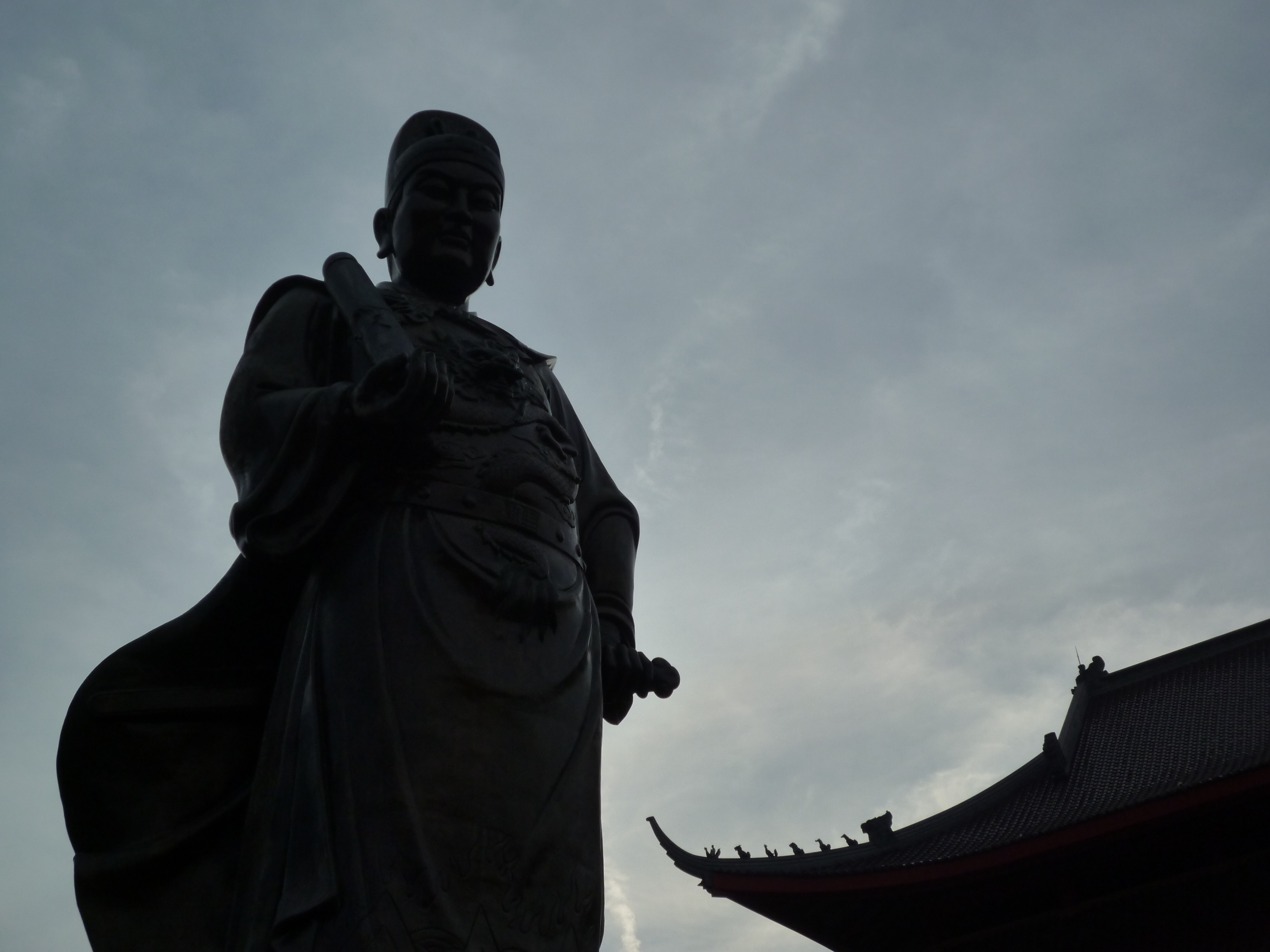 Patung Laksamana Cheng Ho di Kelenteng Sam Poo Kong Semarang